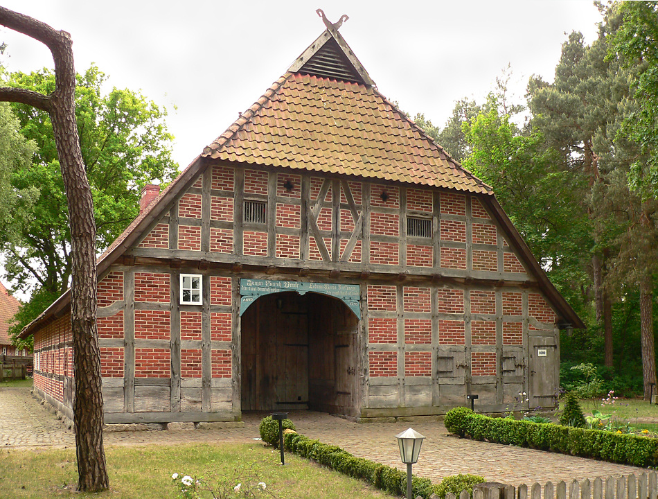 Museumshof Winsen Winsen Museum Farm, Winsen (Aller), Lower Saxony, Germany.